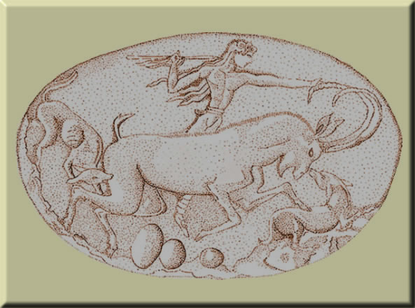 Kritikosichnilatis_Sfragidolithoscorniza1